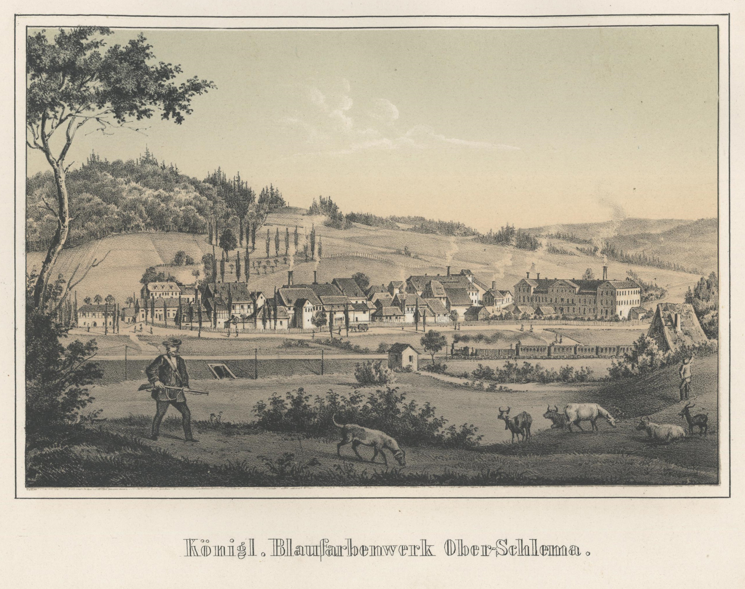 Königliches Blaufarbenwerk Ober-Schlema aus: Album der Sächsischen Industrie Zweiter Band